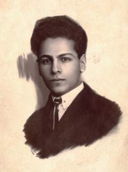 Azerbaijani writer Ali Nazim (1906-1937)